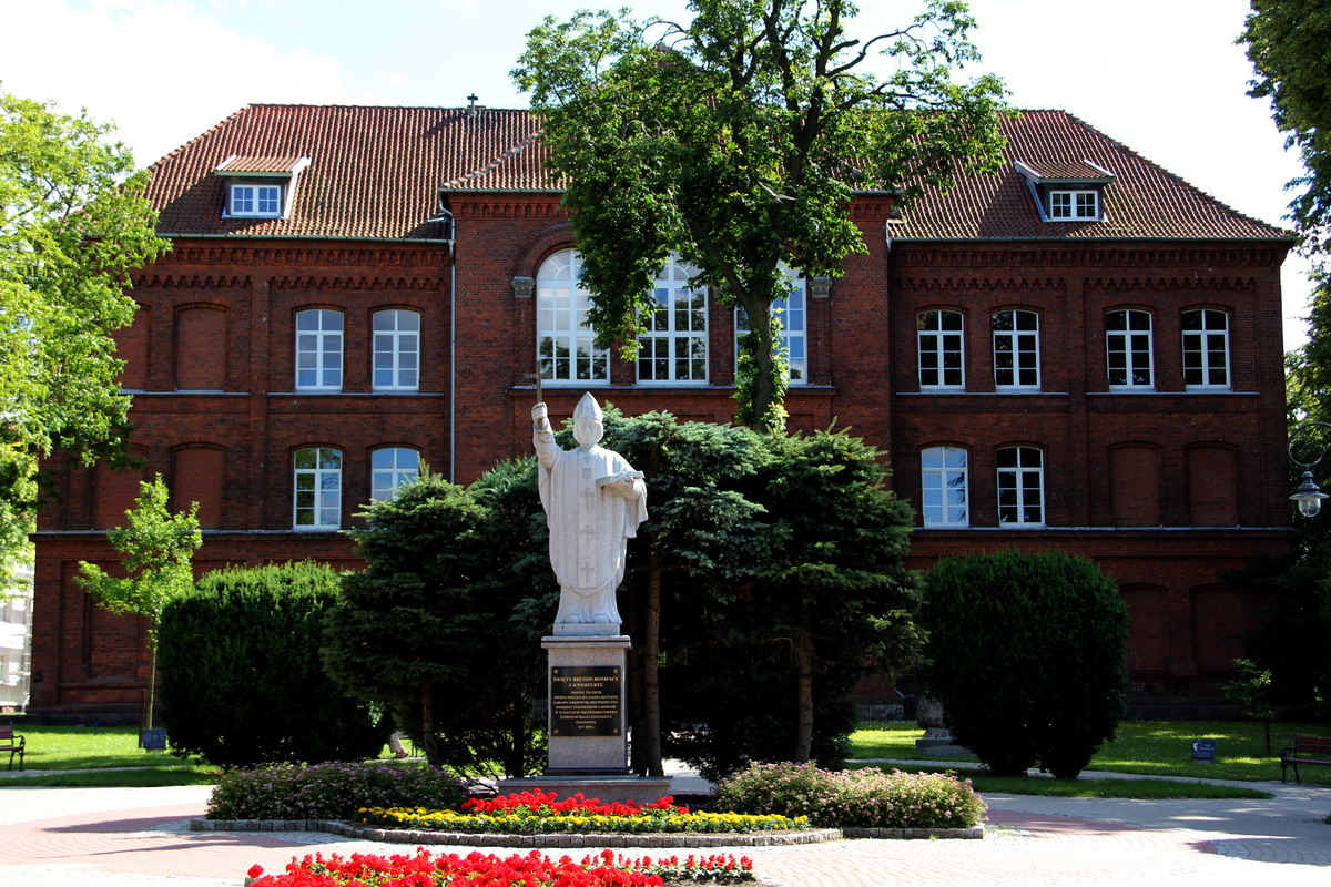 Pomnik patrona Bartoszyc - Św. Brunona, na tle budynku Liceum Ogólnokształcącego im. St. Żeromskiego w Bartoszycach.